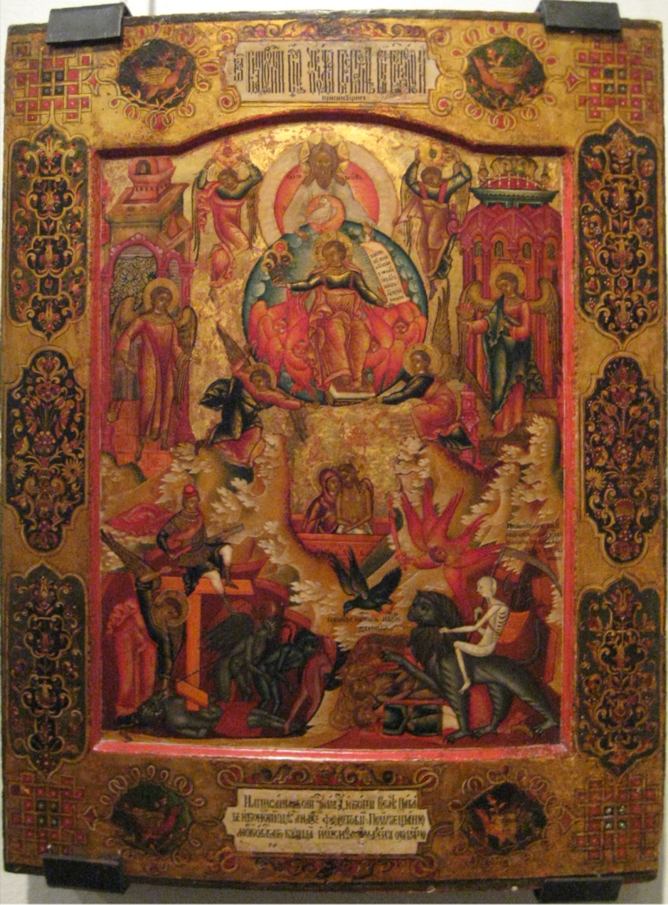 Единородный сын. "The only begotten Son of God"/ The Nizhny Novgorod Art Museum / В центре изображены: Господь Саваоф в славе, с Духом Святым в виде голубя на лоне; ниже - Спас Эммануил, восседающий на херувимах, в славе, поддерживаемой двумя ангелами; в правой руке его - тетраморф (символы евангелистов), в левой - свиток с текстом. По сторонам - два ангела, которые держат солнце и луну, и еще два ангела, на фоне высоких зданий, левый ангел - с кадилом. Ниже - композиция "Не рыдай Мене Мати". Внизу слева ангел побивает поверженного и прободенного крестом сатану. На кресте восседает Христос в образе воина в доспехах, от вида Которого толпа нечистых пытается укрыться в черной пещере. Справа внизу звери, пожирающие грешников, и смерть с косой на апокалиптическом звере. Композиция составлена на текст песнопения, исполняемого на литургии Иоанна Златоуста./Начало XVIII века/ Нижегородский государственный художественный музей